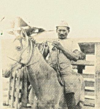 El célebre "Cabrestero" (persona que va delante guiando el ganado) María Nieves, cuyo nombre completo era Ángel María Nieves, inmortalizado por Rómulo Gallegos en su novela Doña Bárbara.